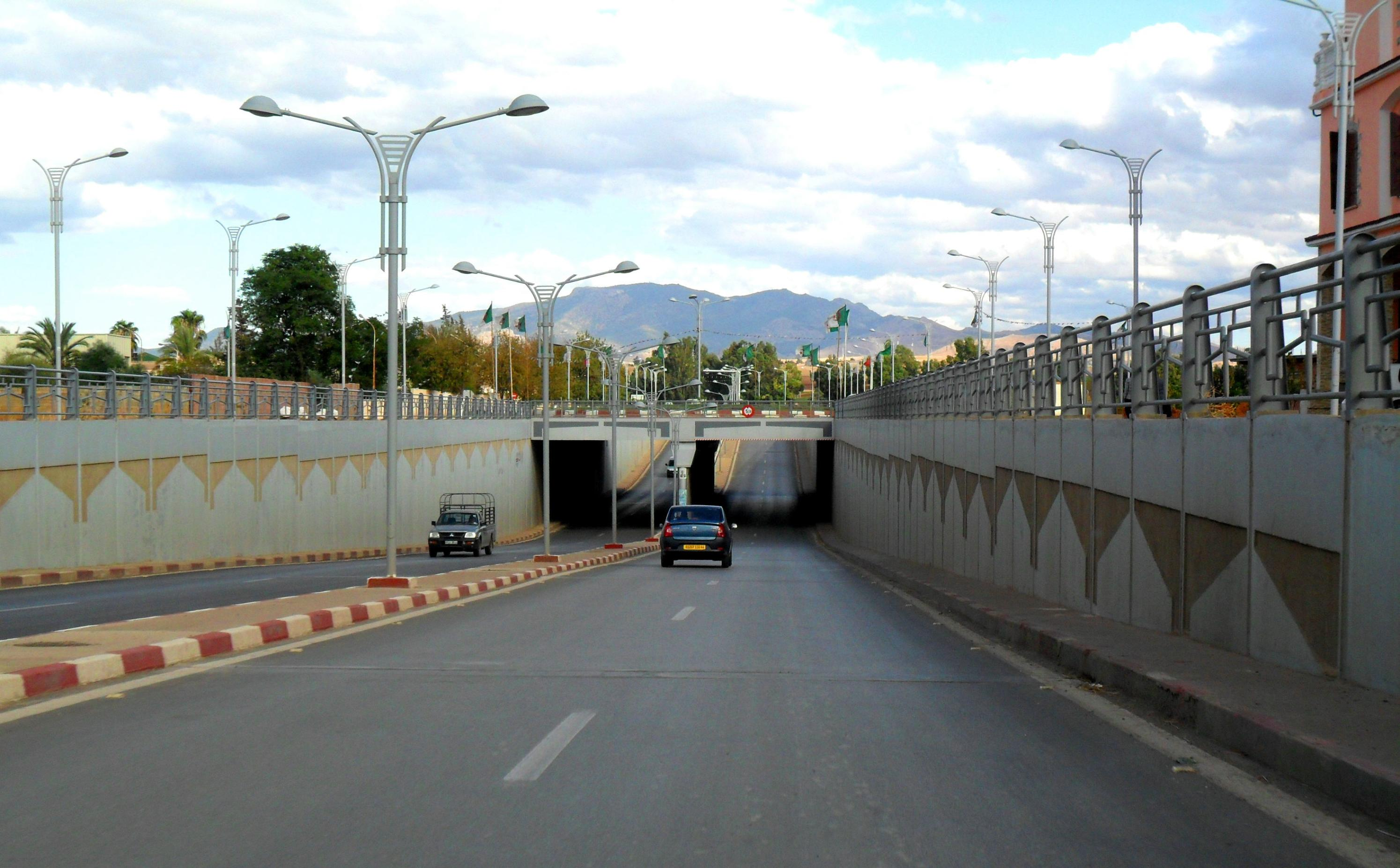 Route Nationale 4, trémie de Rouina